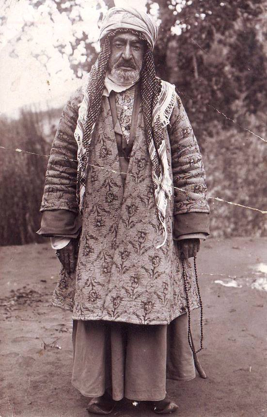 Hazret-i Şah Ali Hüsameddin